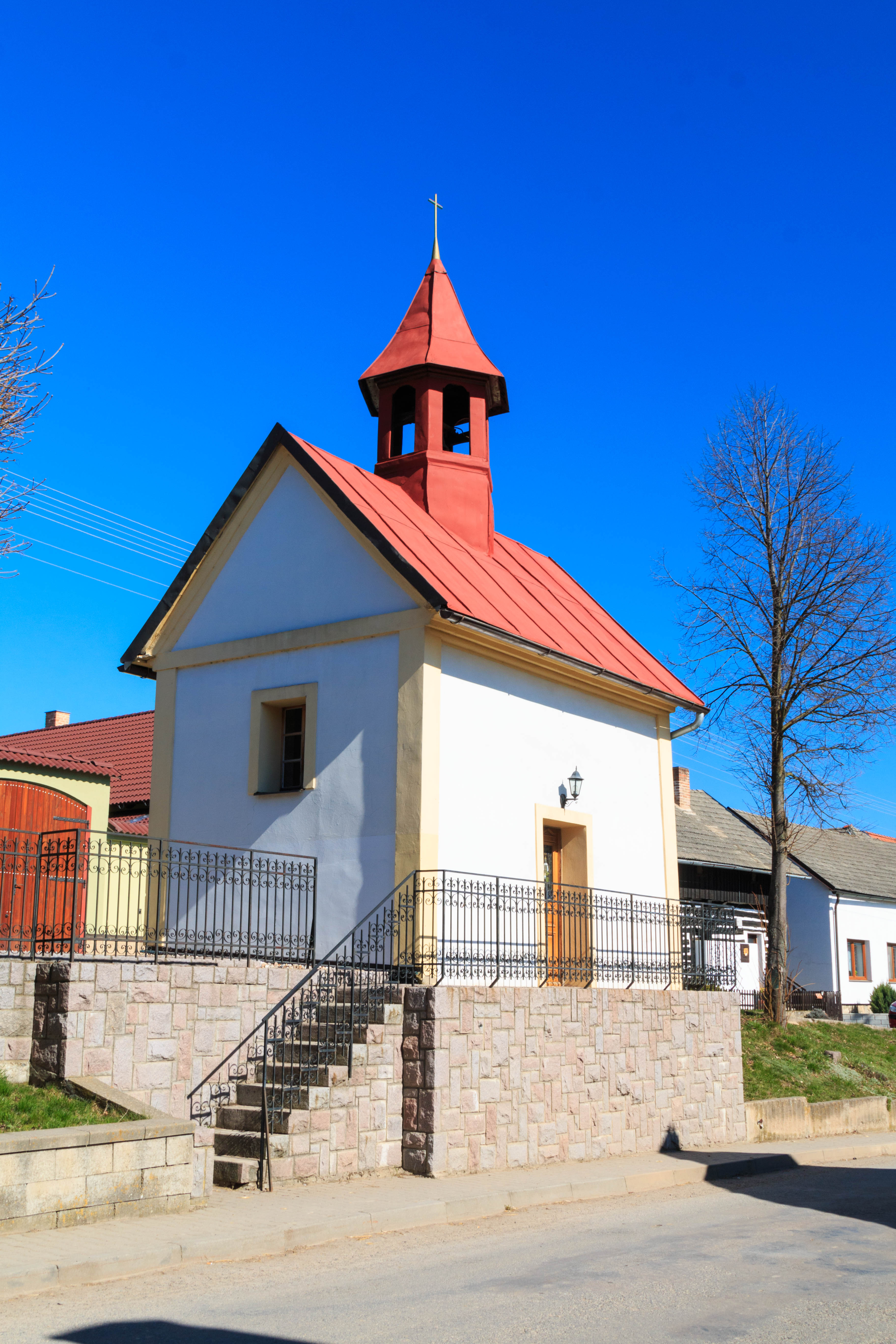 Zderaz - kaple